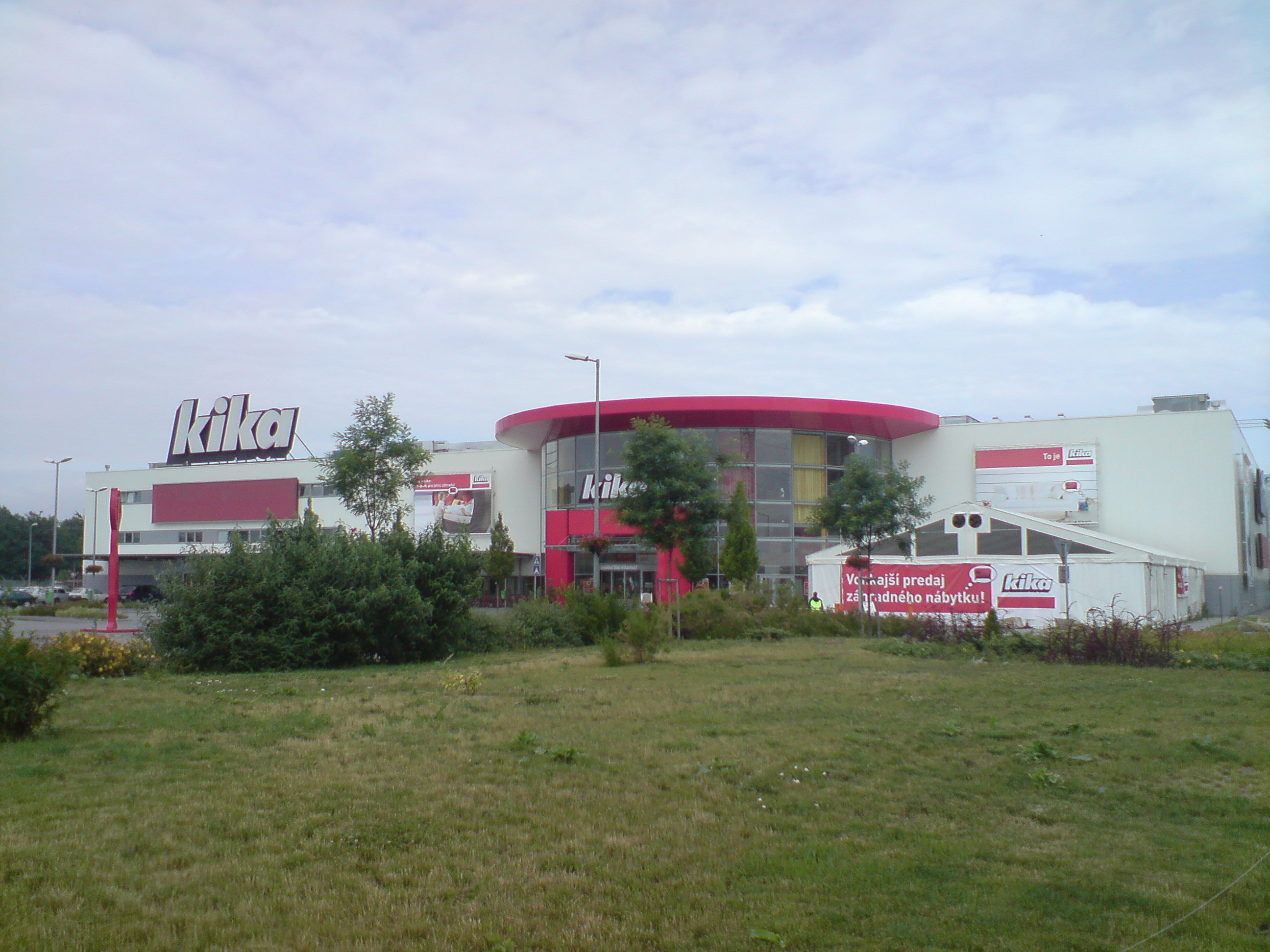 Obchodný dom Kika